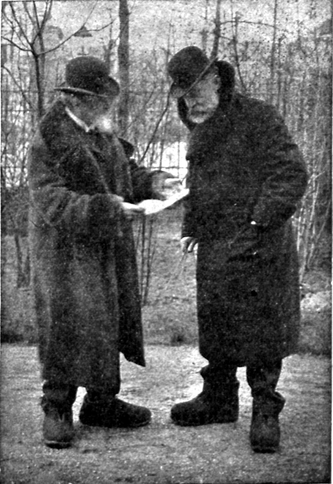 Die Professoren Kießling und Kuehl im Schnee auf dem Dresdener Ausstellungsplatz beim Treffen der ersten Vorbereitungen für die nächste Ausstellung